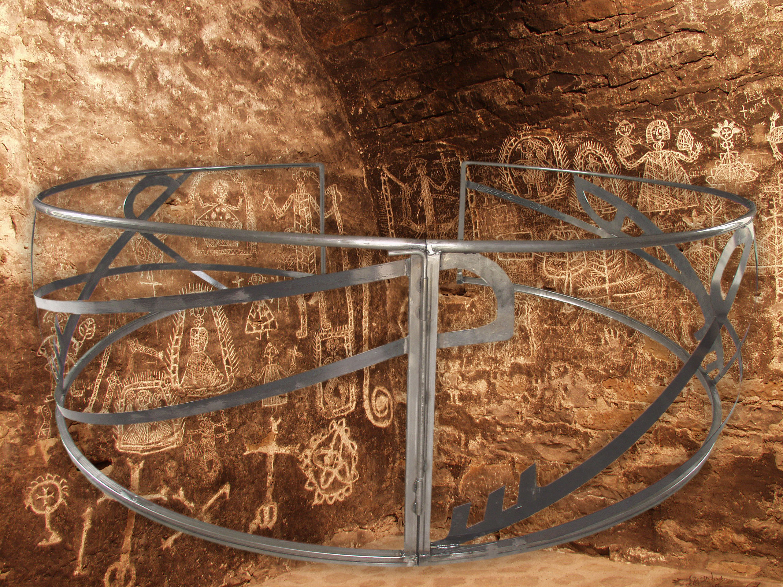 Escultura de hierro en forma de gran pulsera colocada en la cárcel de Broto para preservar los grabados. Montaje